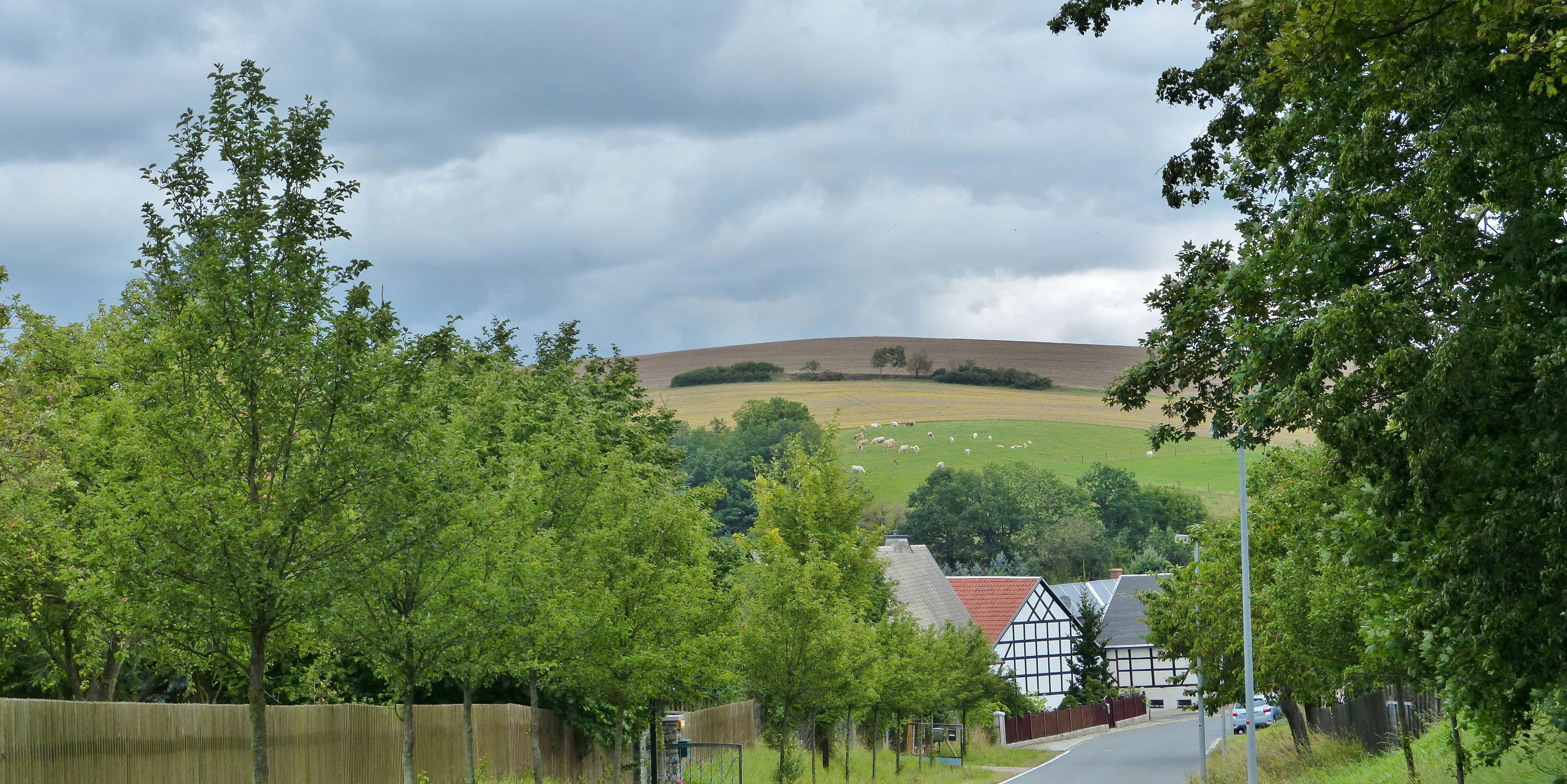 Der Wachberg über der Waltersdorfer Hochfläche, ragt 140 Meter über den alten Ortskern und der Rüßburg.